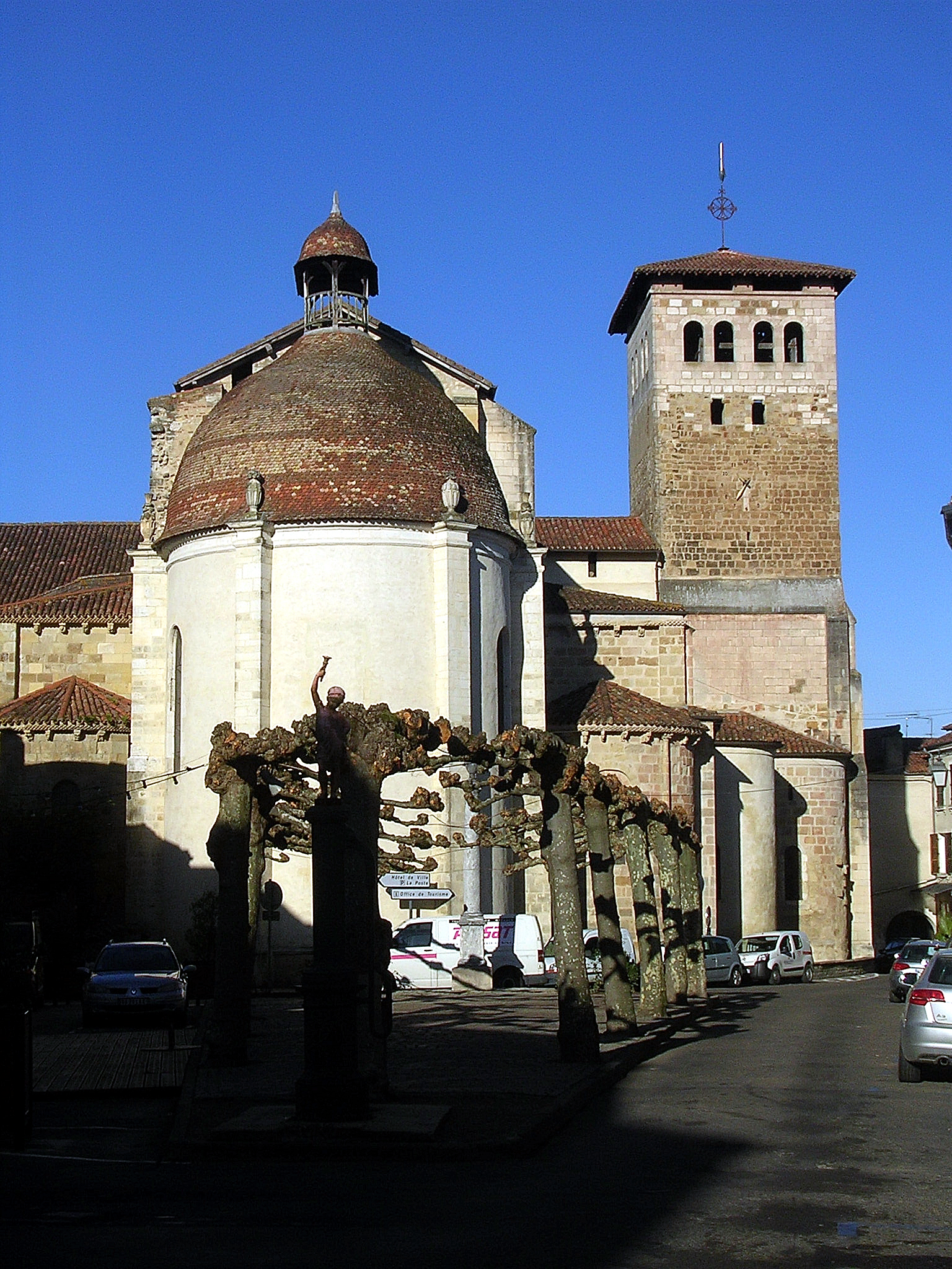 Abside de l'abbaye de Saint-Sever (Landes, France)